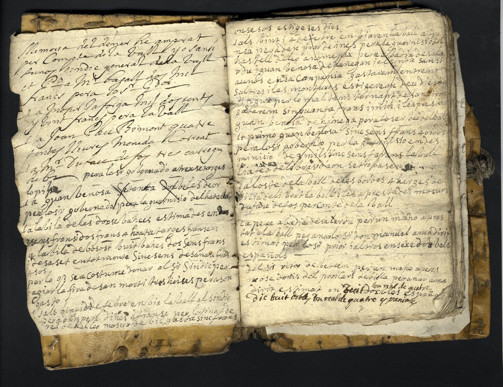 Llibreta del sindicat de Sanci Aunòs Demiguel, Sindic Generau d’Aran entre 1710 i 1712